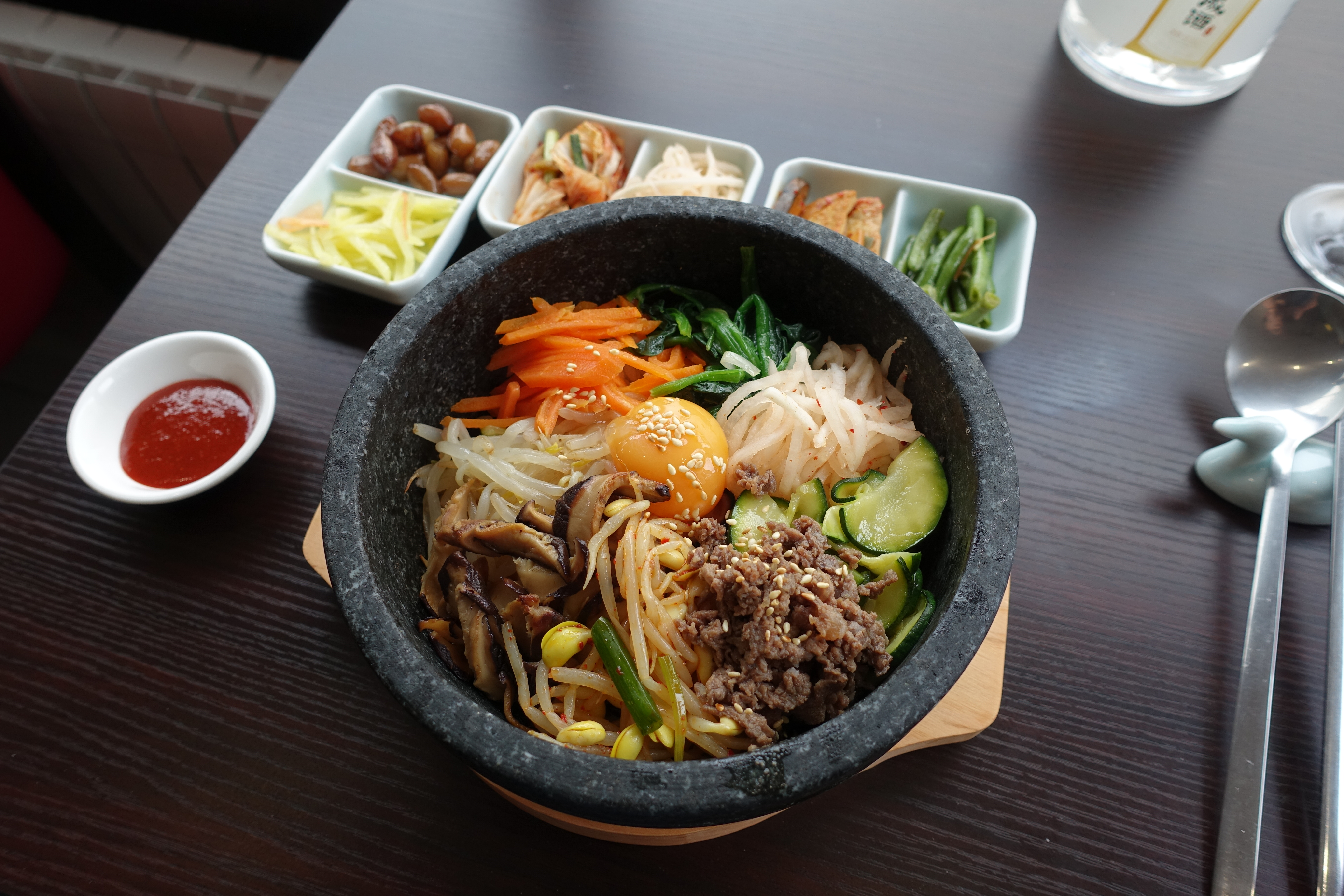 Dolsot Bibimbap @ Hangang @ Paris 15